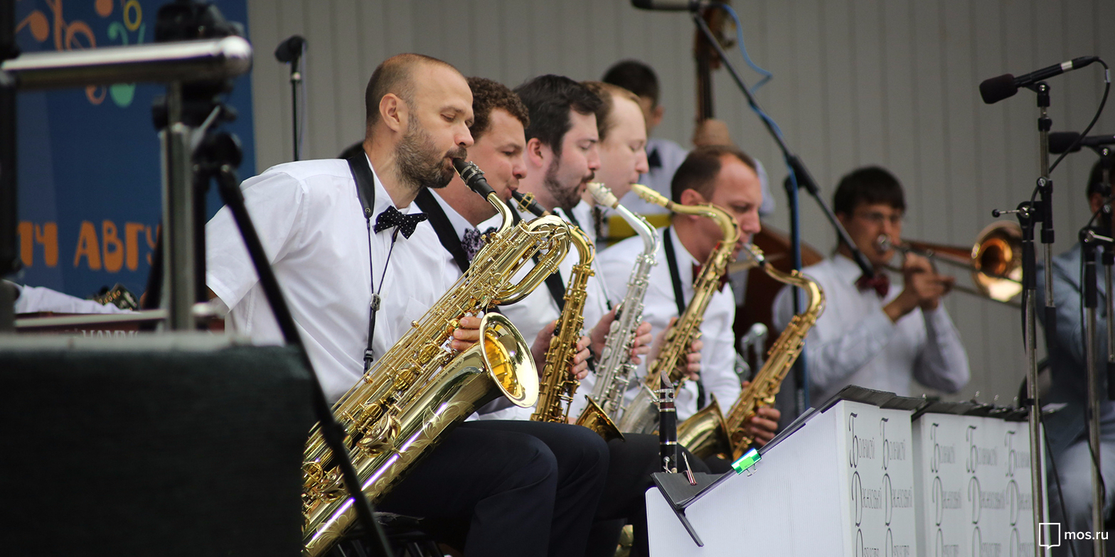 XX Московский международный фестиваль «Джаз в саду “Эрмитаж”»